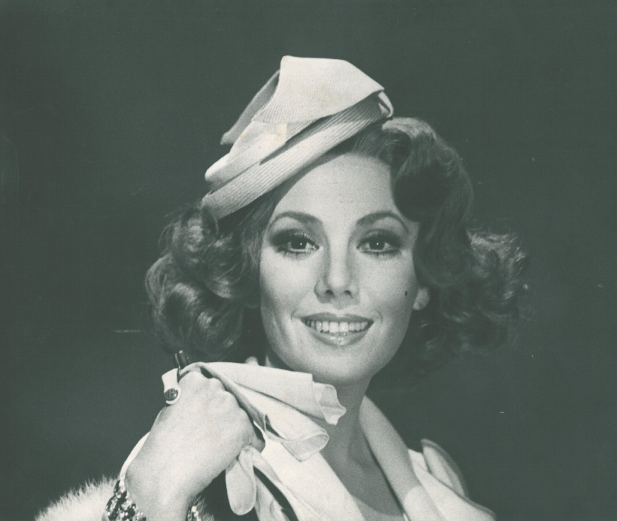 “Il Corsaro” di M .Achard Regia di A. G. Majano Foto: Grazia Maria Spina